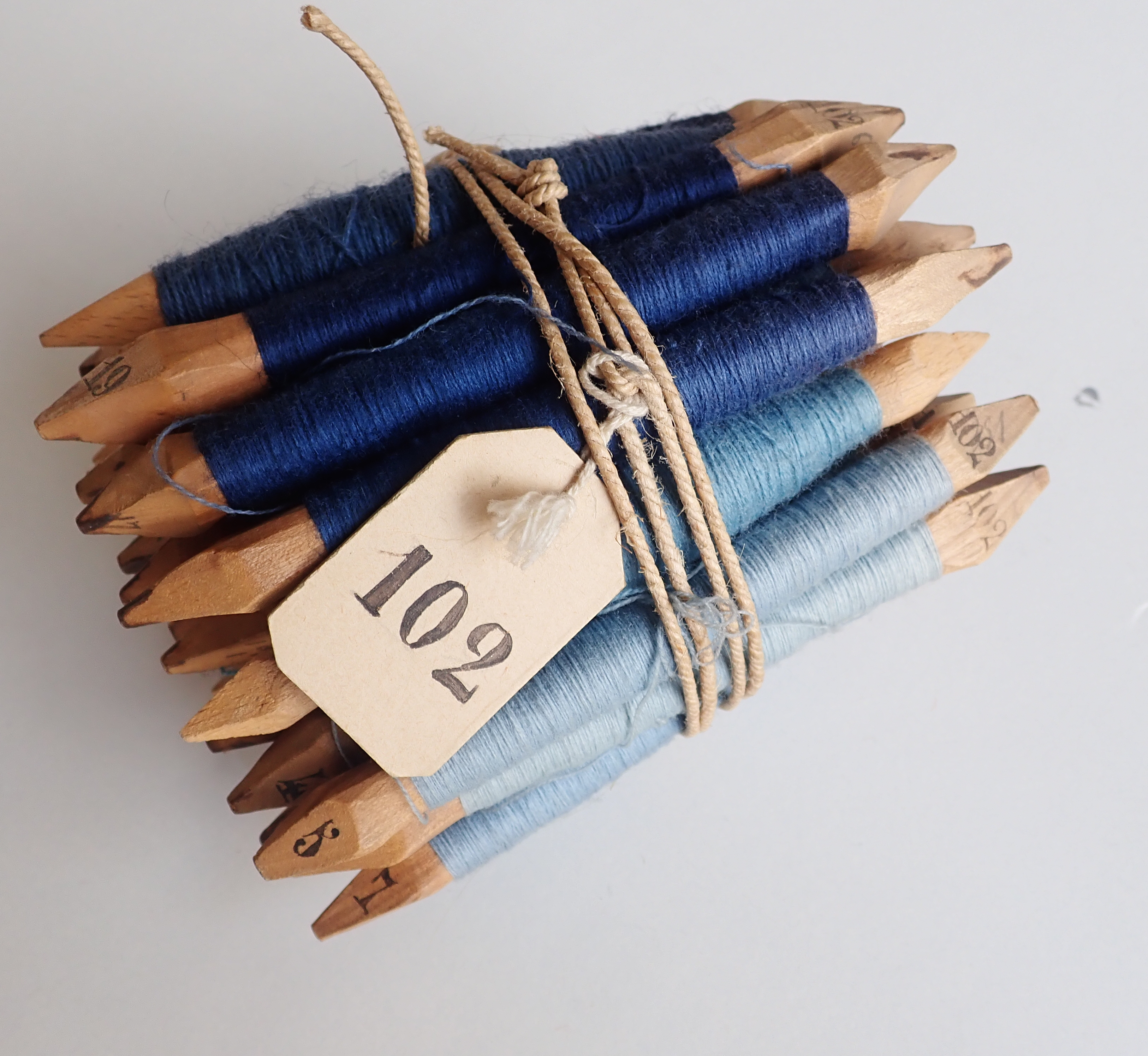 Paquet de Flutes - ancien classement d'échantillons à la manufacture nationale de tapisseries de Beauvais, Mobilier national, Paris (France)